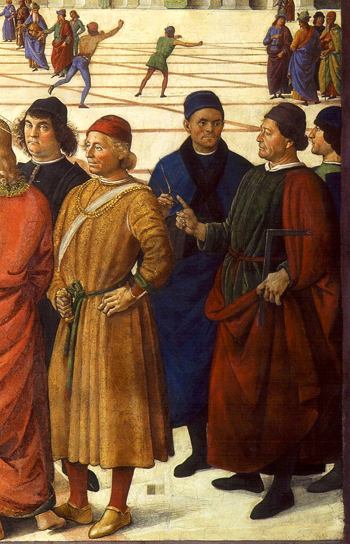 Ausschnitt aus Perugino Schlüsselübergabe; Portraits von Andrea Bregno und Baccio Pontelli